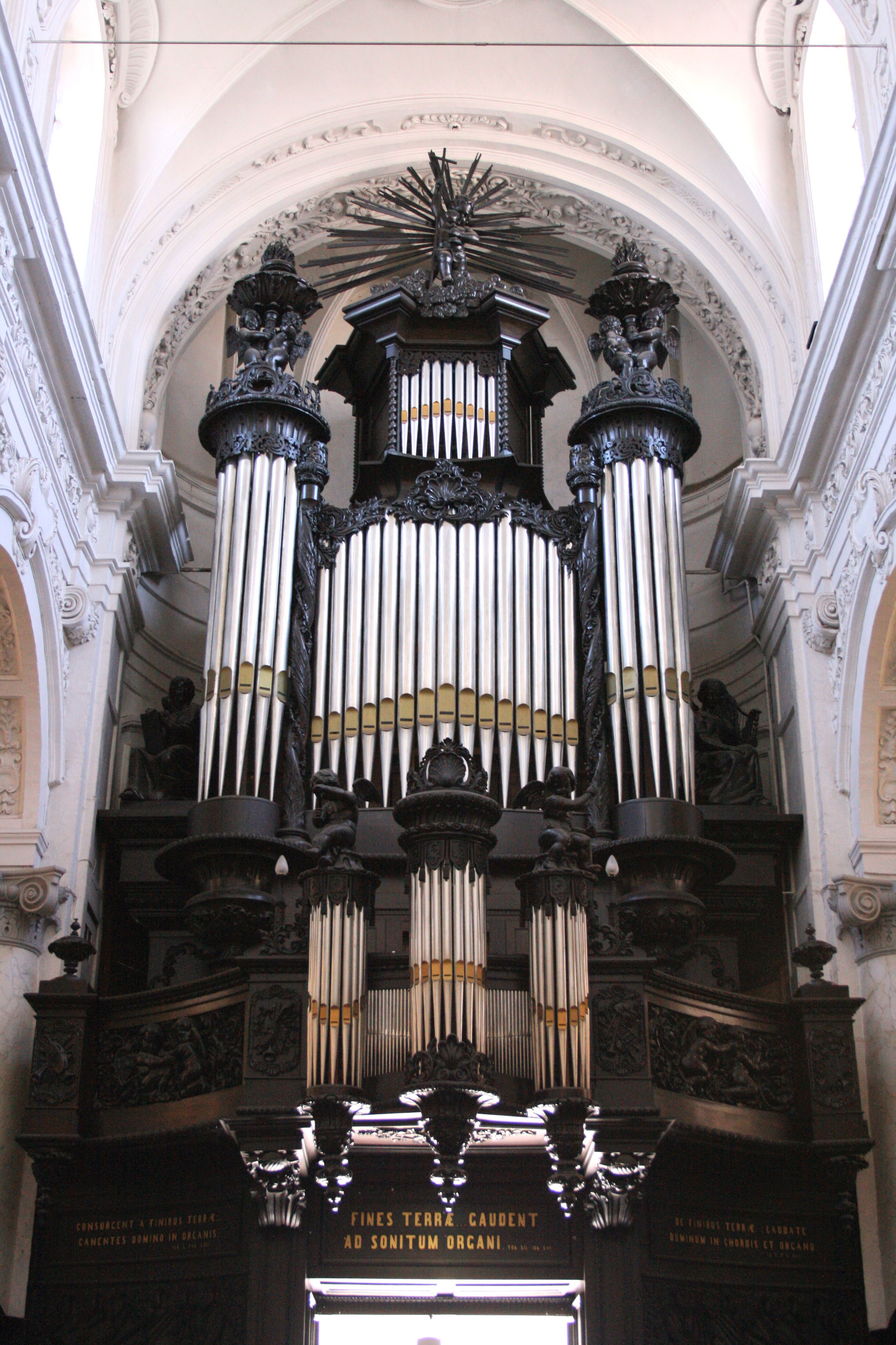 Eglise Notre-Dame du Finistère, rue Neuve, Bruxelles (Belgium). Détail: orgue